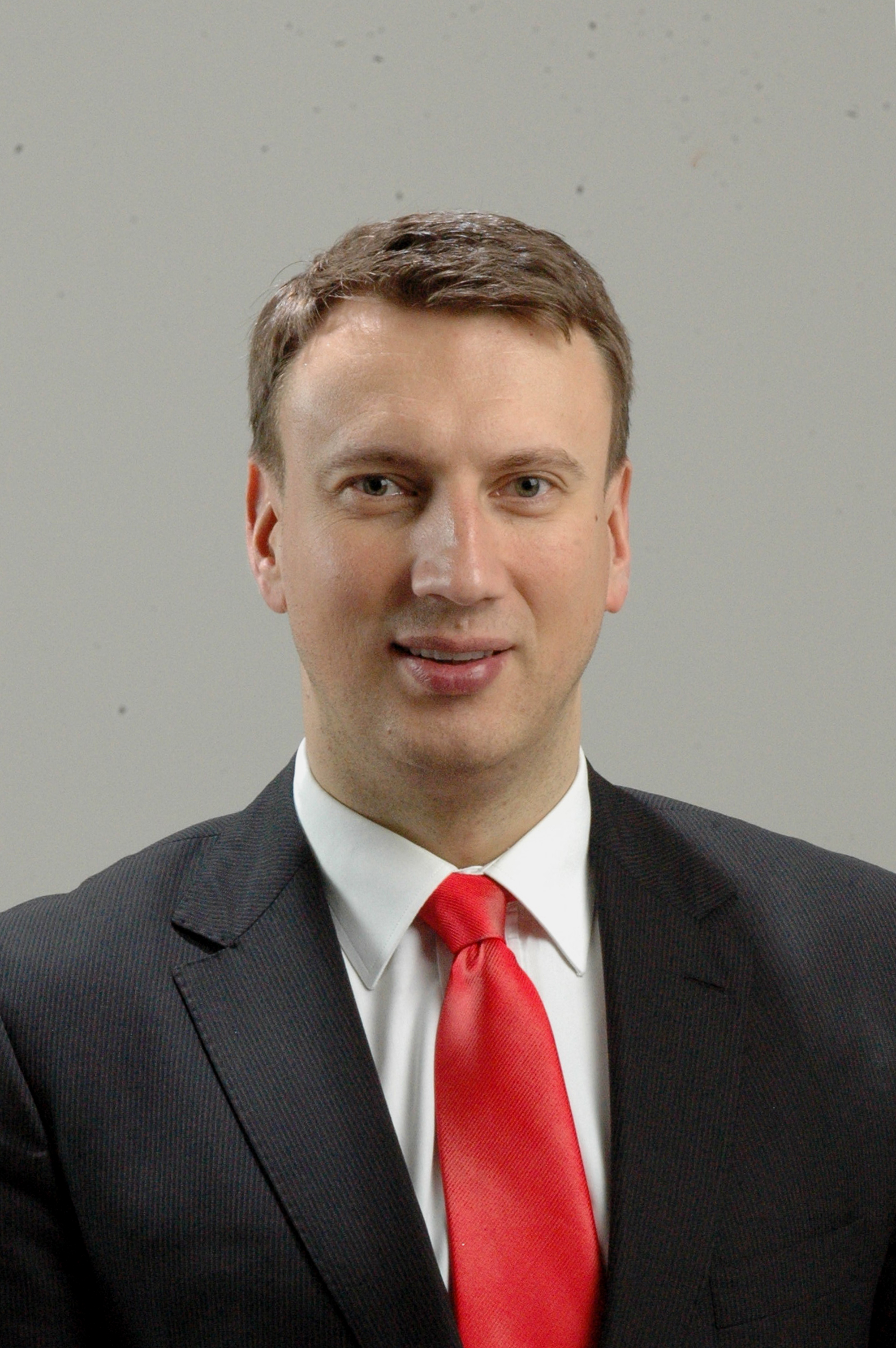 Foto: Saeima